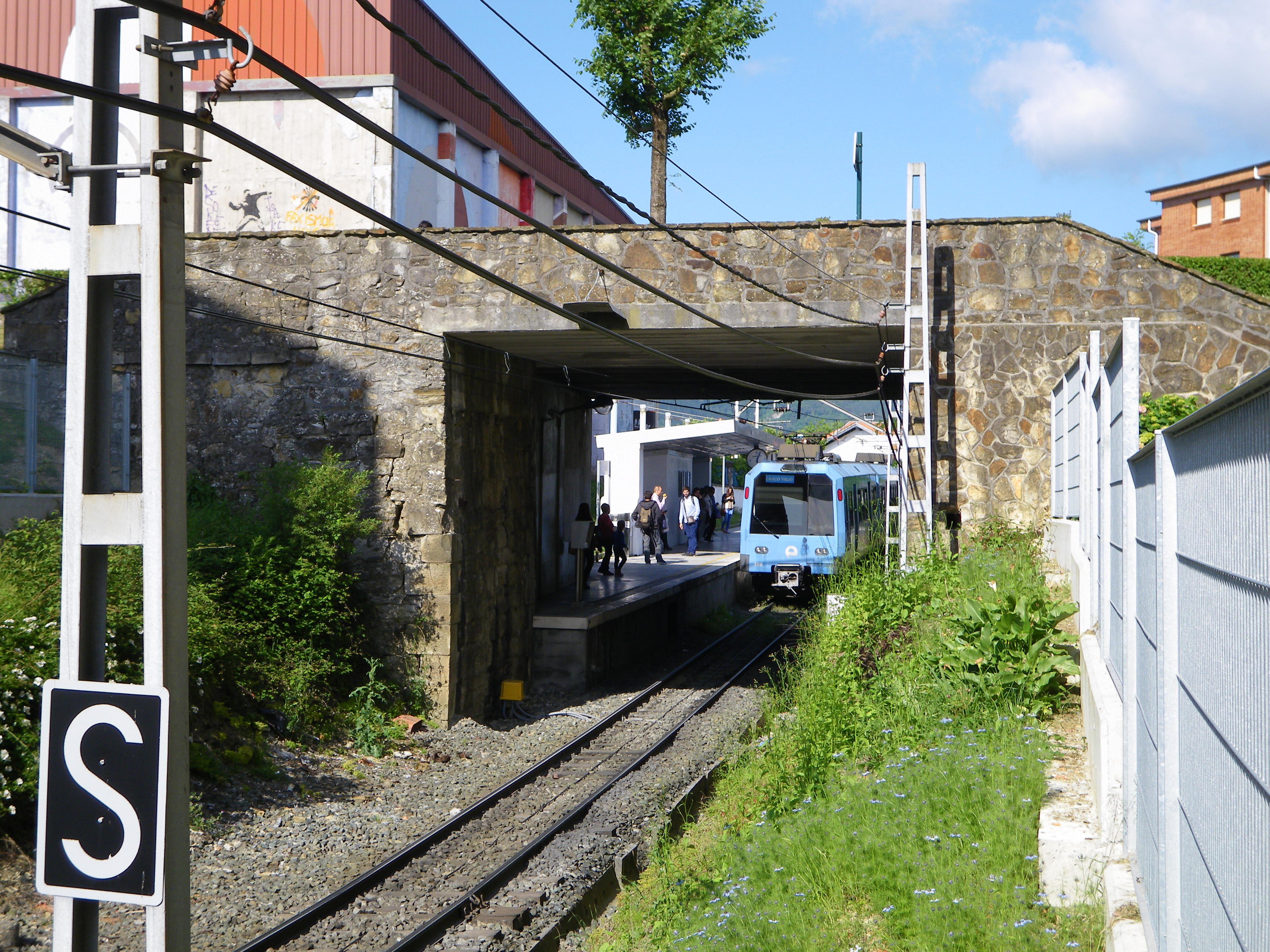 Zamudioko tren geltokia, Zamudio, Txorierri, Bizkaia, Euskal Herria.